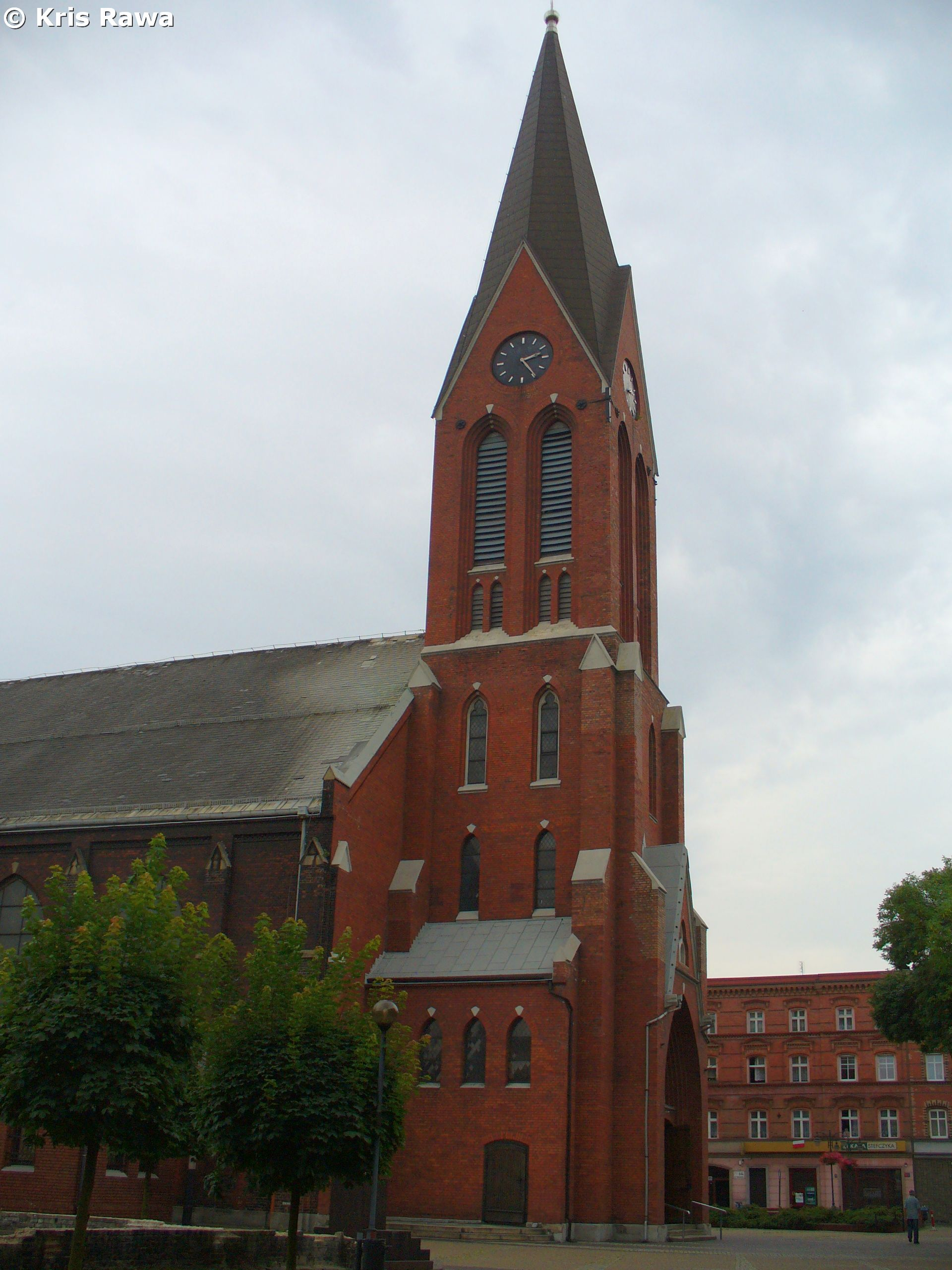 Kościół św. Piotra i św. Pawła w Świętochłowicach